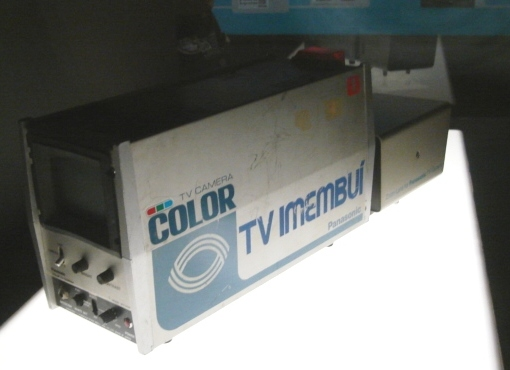 Câmera da TV Imembuí na exposição No Ar 50 Anos de Vida.